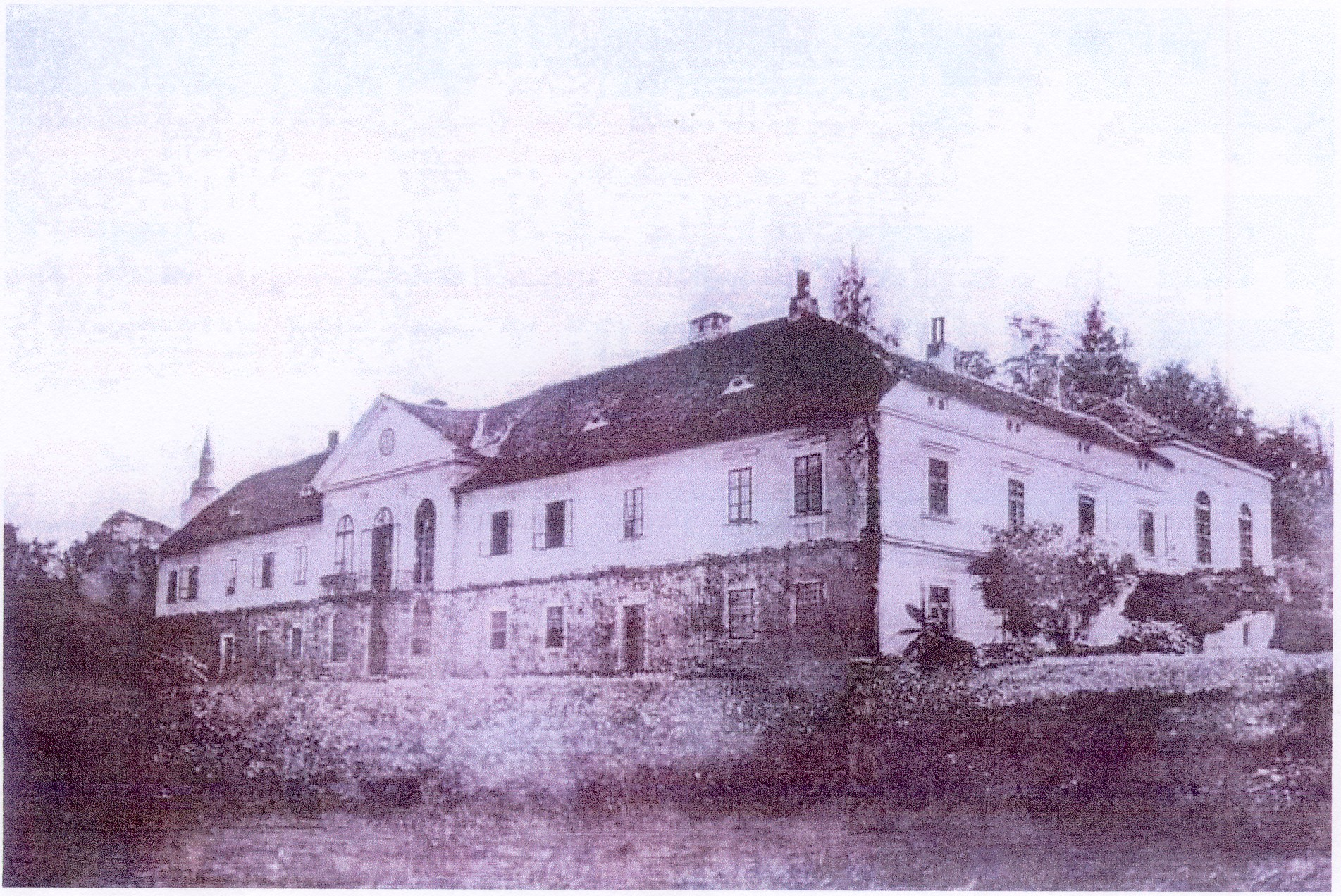 Bilovice Manor in Moravian Slovakia, c1860, old photograph